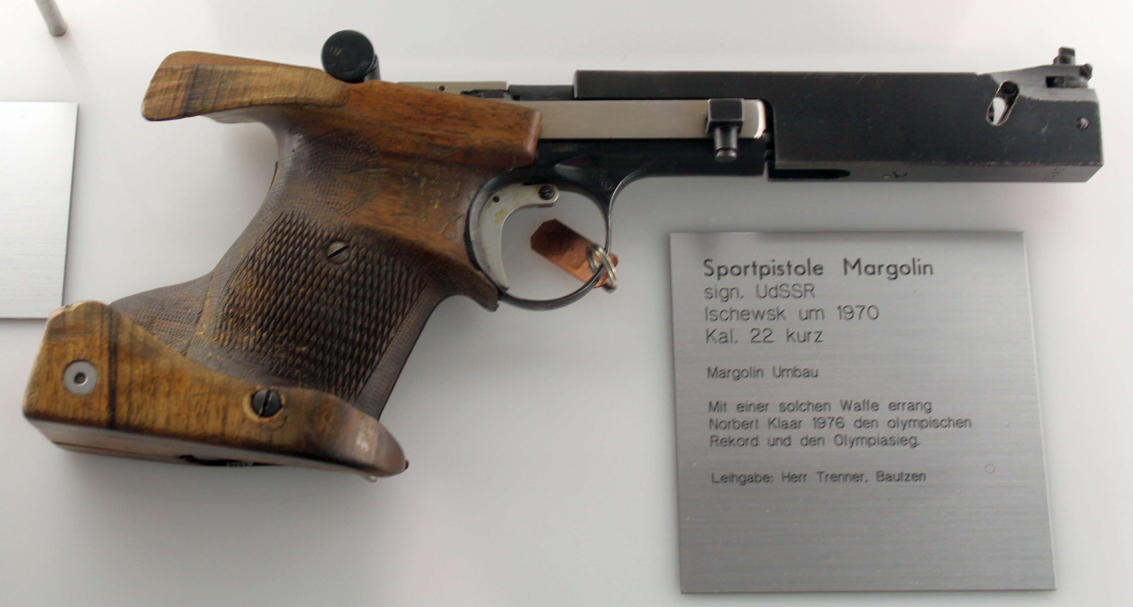 Umgebaute Margolin MZM Sportpistole für Olympisch Schnellfeuer im Waffenmuseum Suhl.